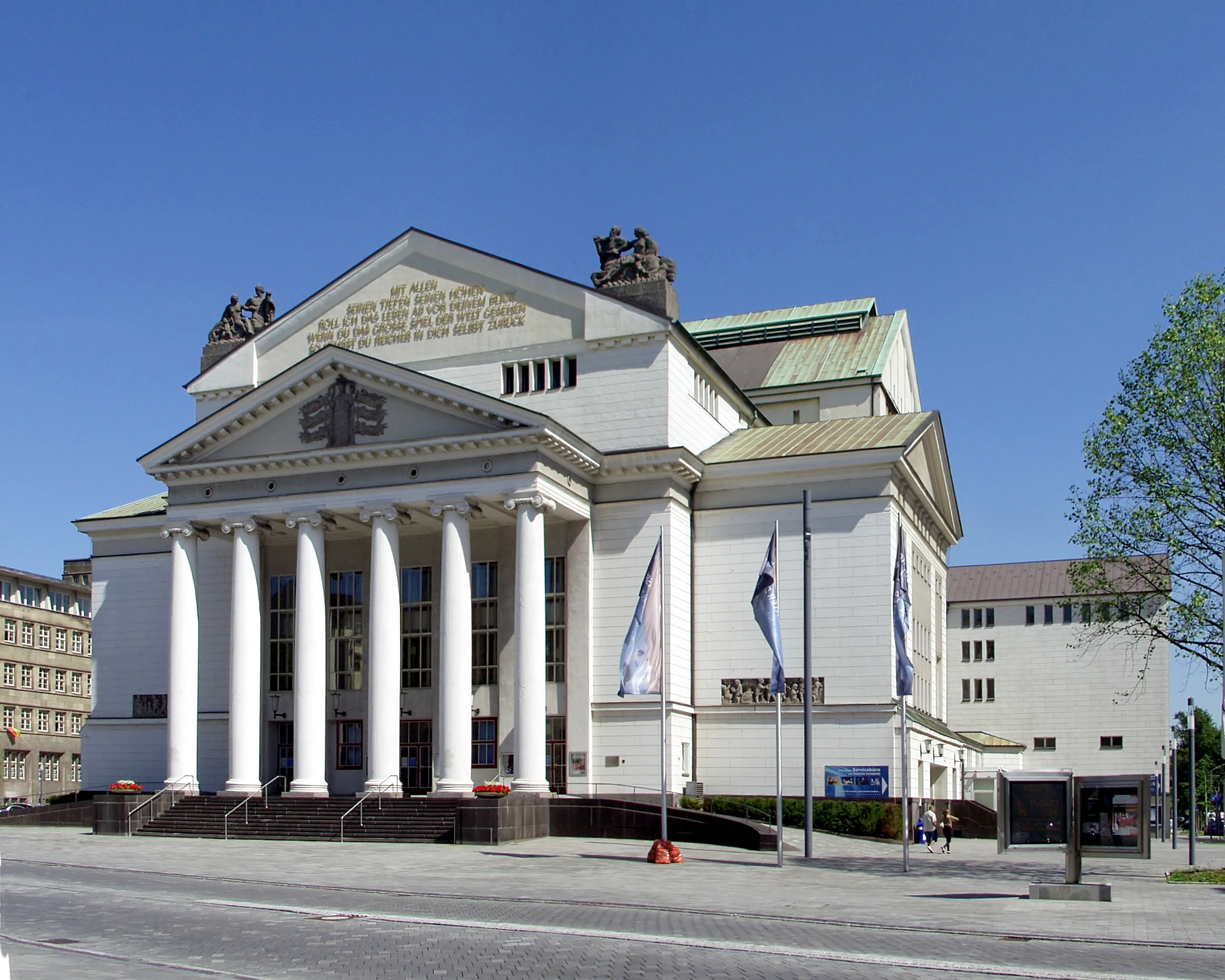 Das von Martin Dülfer entworfene Stadttheater Duisburg This is a photograph of an architectural monument.